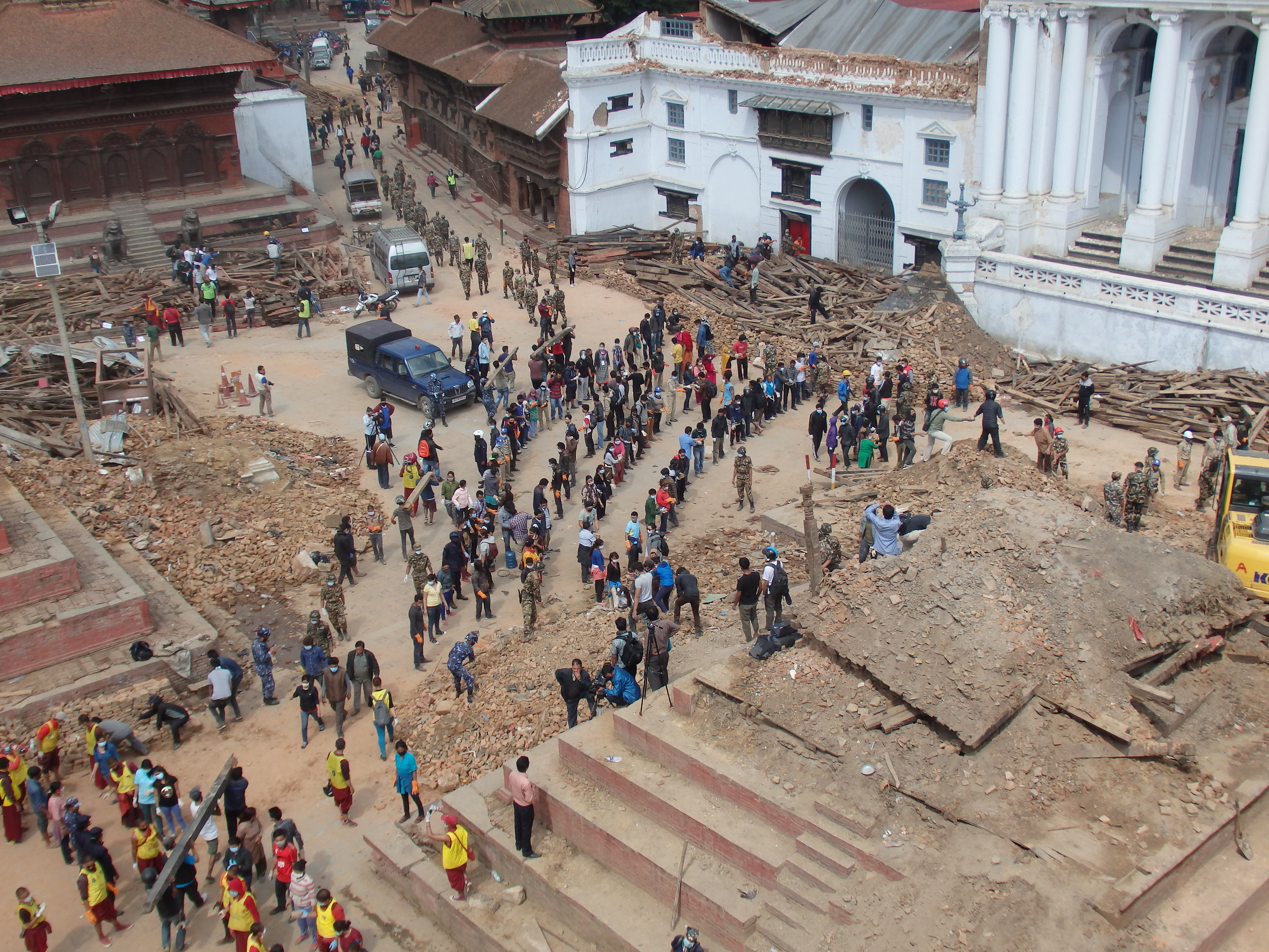 Volunteers